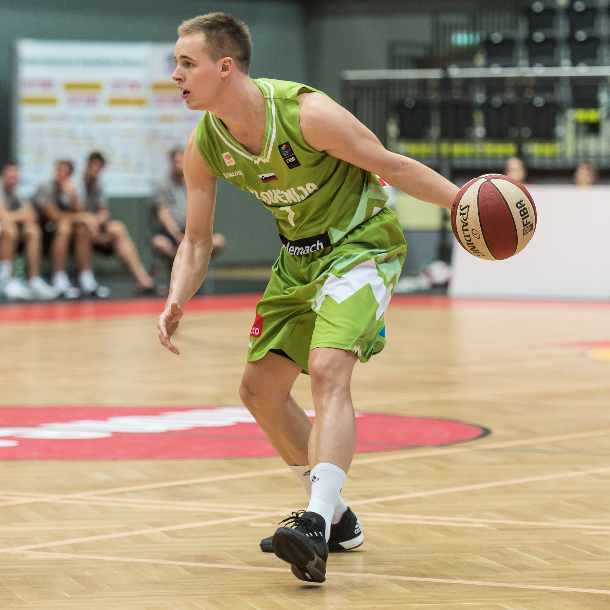 ÖBV Vier-Nationen-Turnier vom 12.-14. August 2016 in Schwechat - Island vs Slowenien. Bild zeigt Klemen Prepelic (SLO).